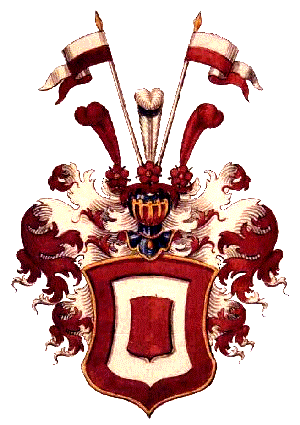 Blason de la branche des von Randow anoblis en 1804